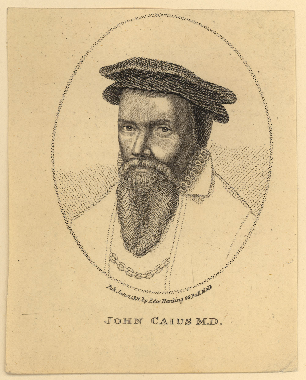 John Caius (1510-1573) Arzt